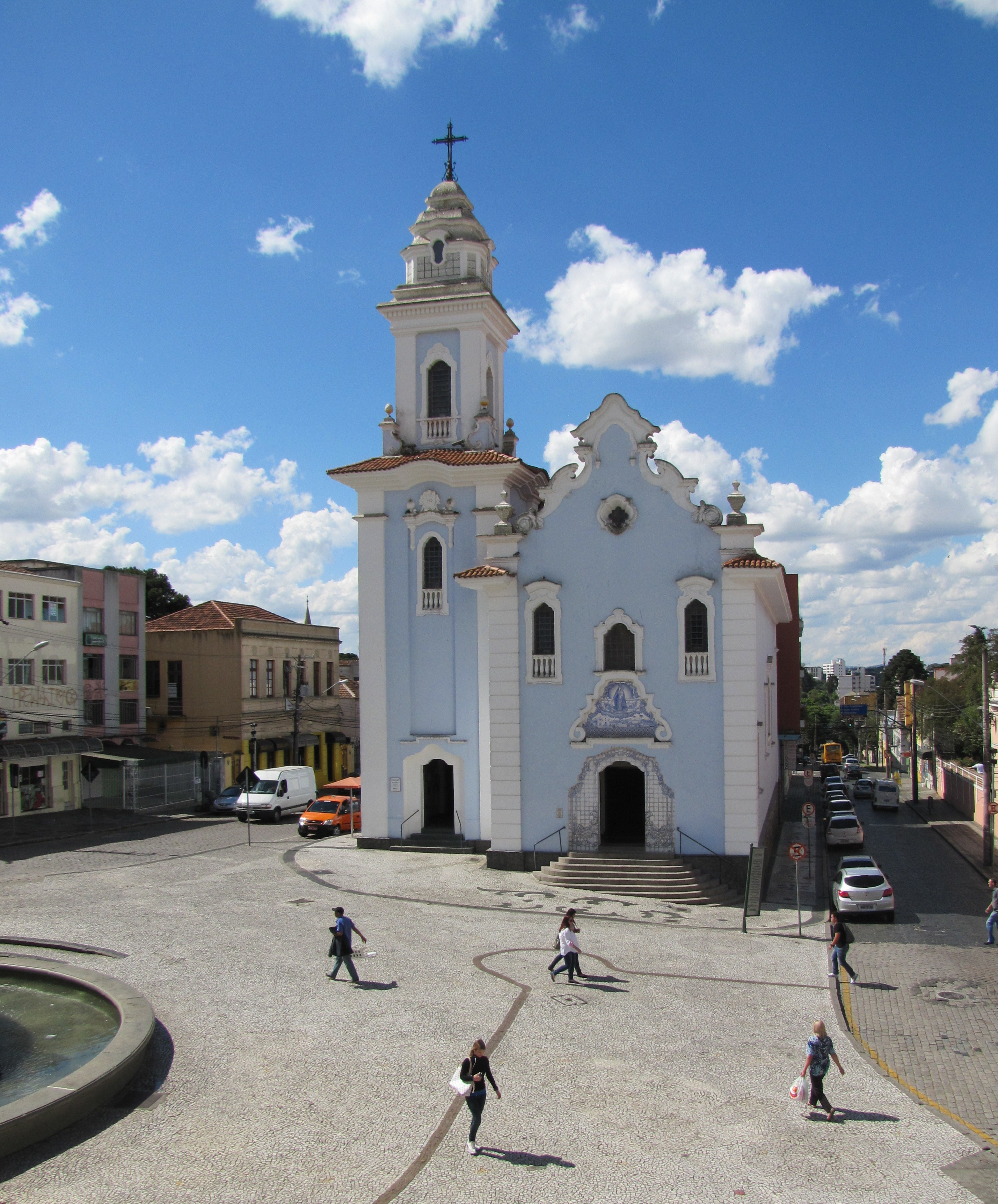 Igreja do Rosário, no Centro Histórico de Curitiba, PR.